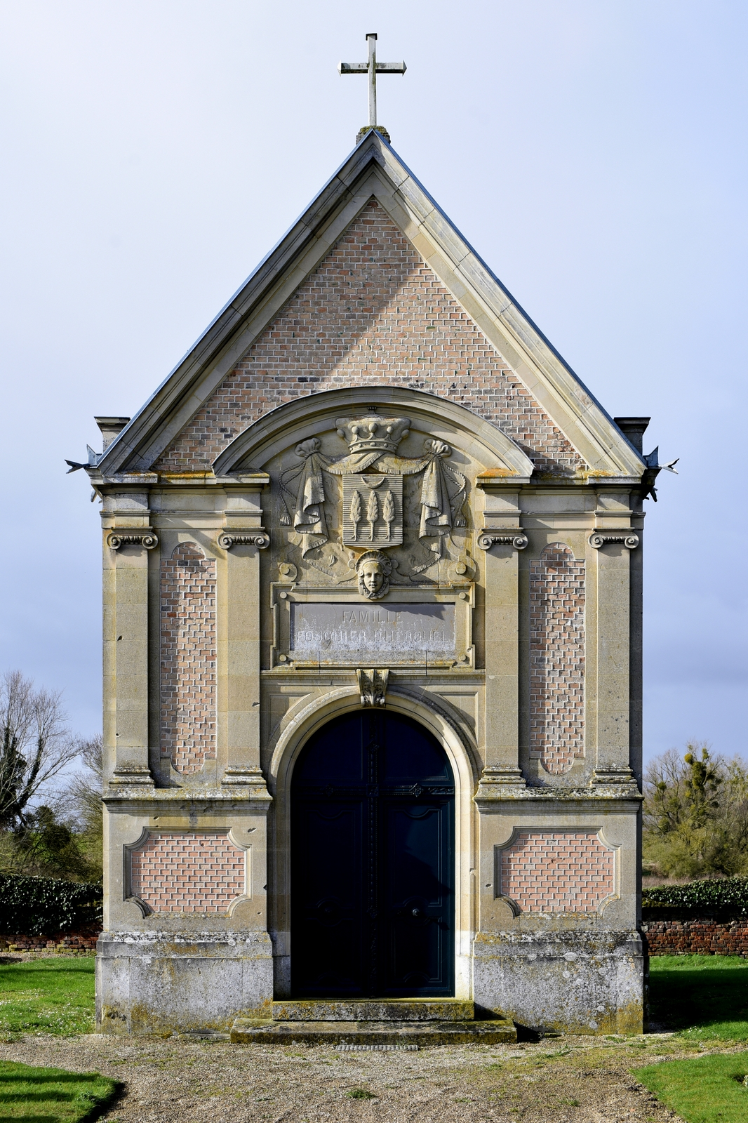 Chapelle